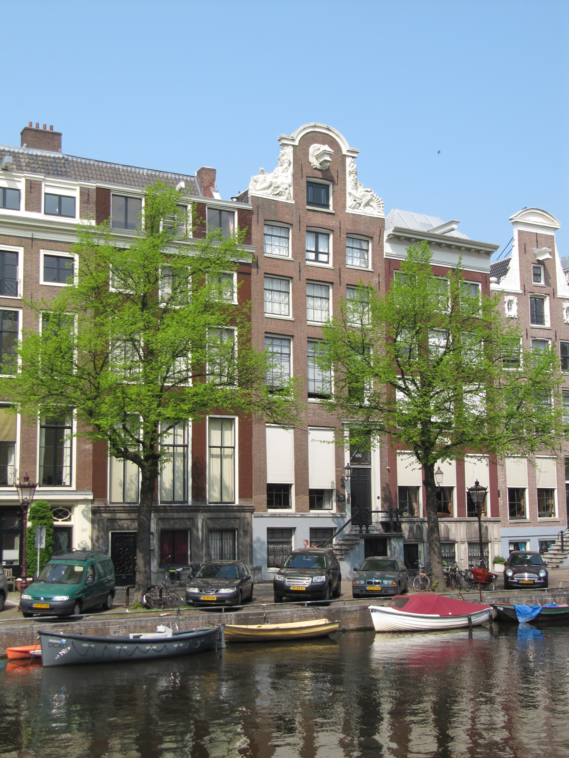 RM2420 Amsterdam - Keizersgracht 695.jpg